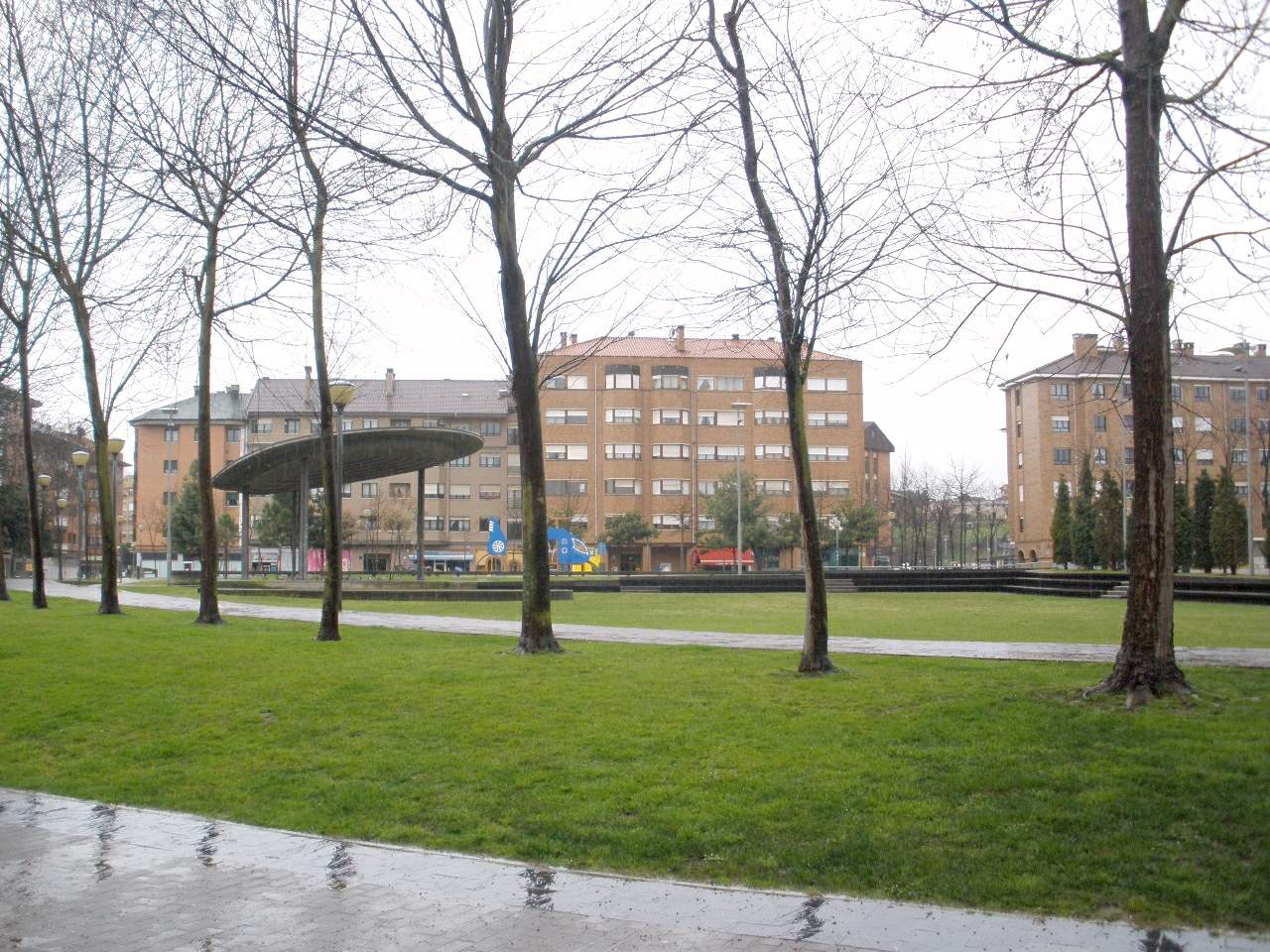 Lugones (Asturias)